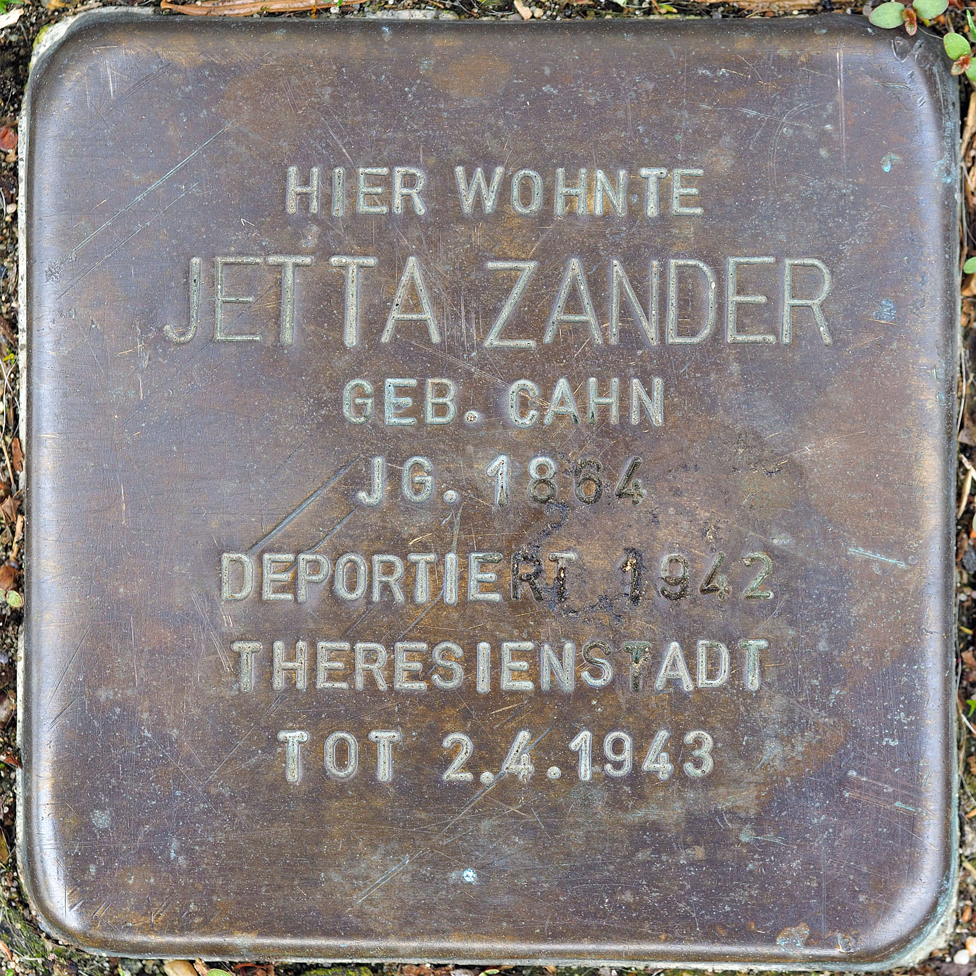 Stolpersteine MG: Zander, Jetta